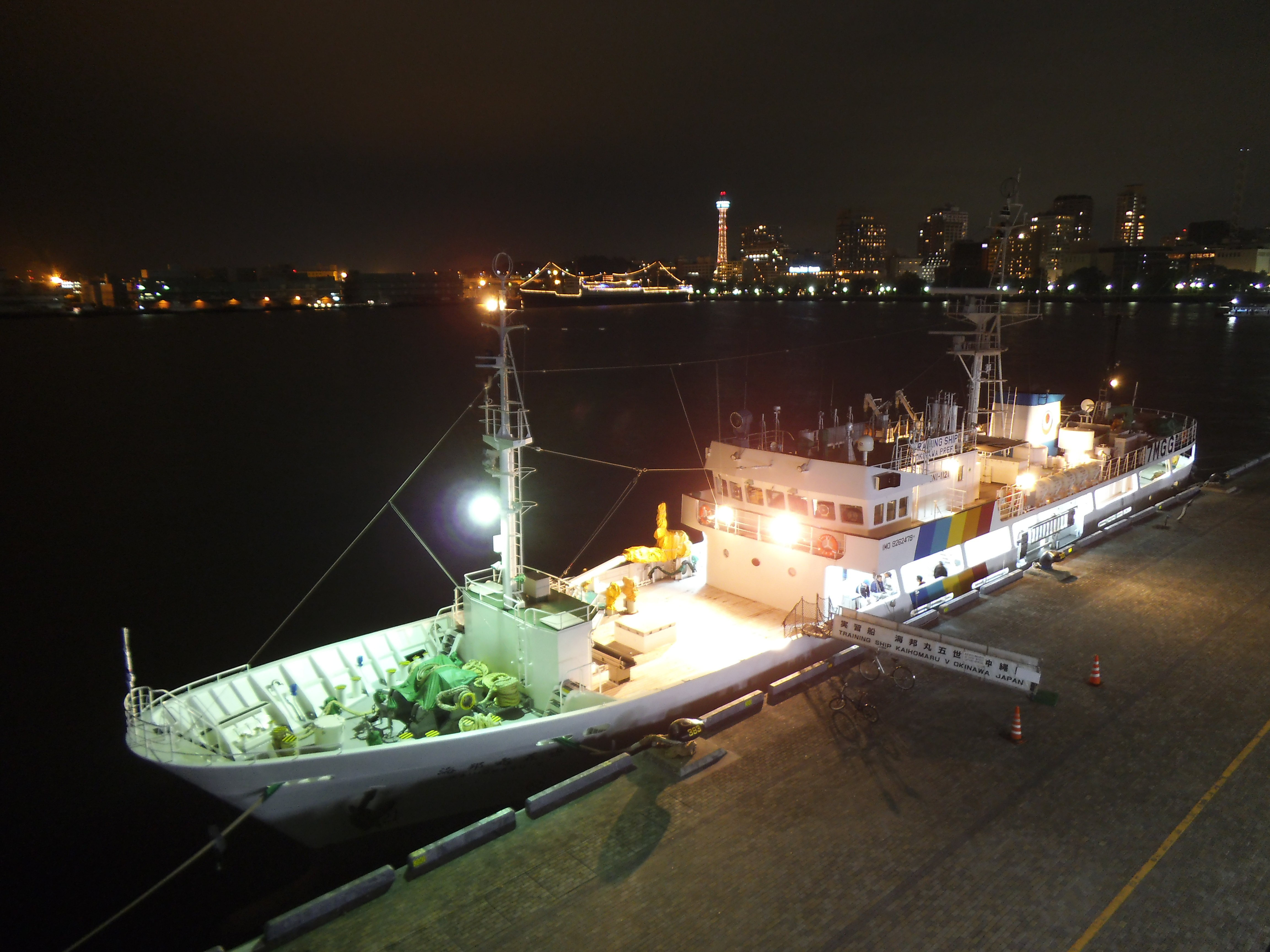 沖縄県立沖縄水産高等学校の練習船海邦丸五世、横浜港大さん橋にて